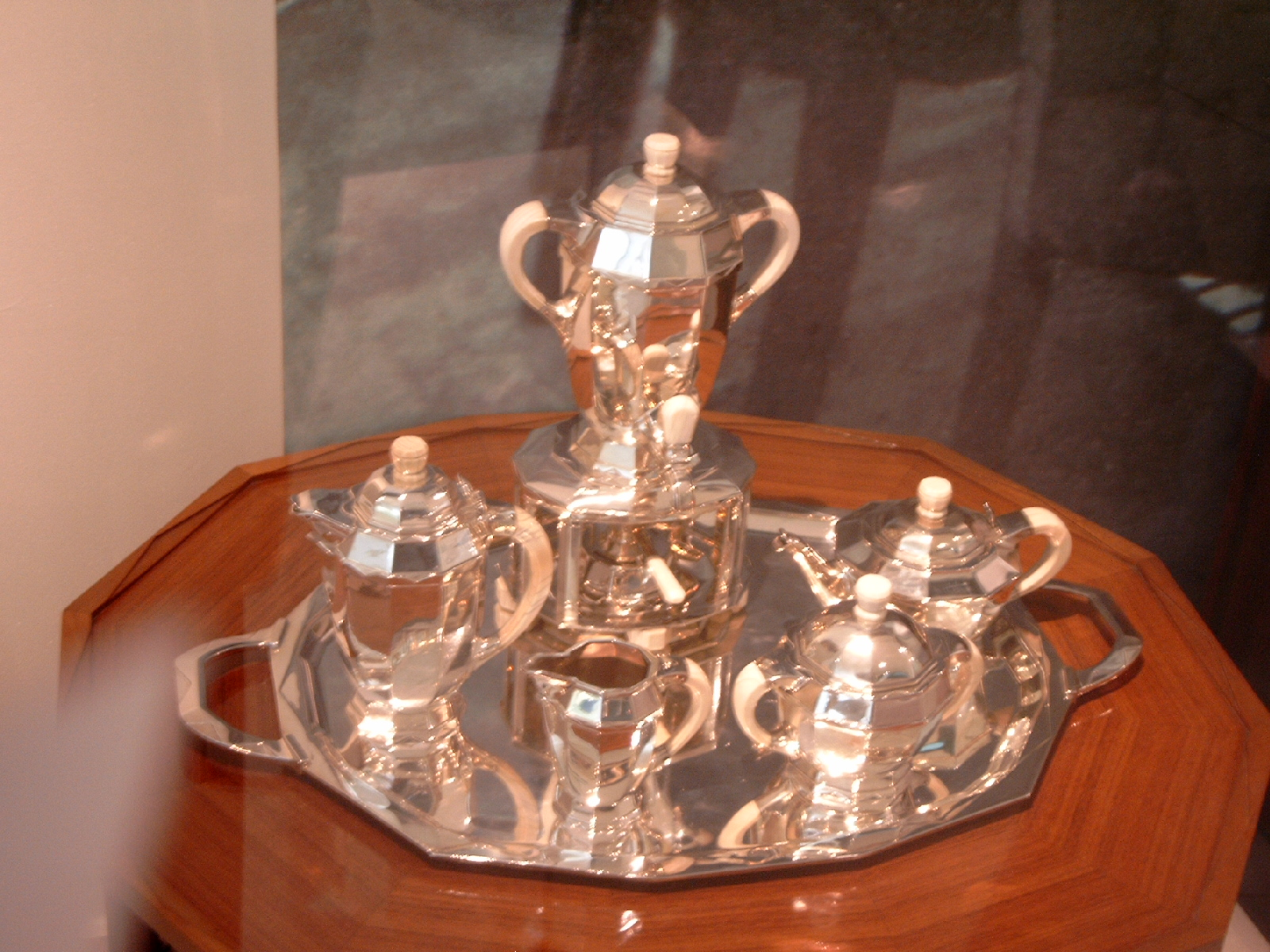 Thee- en koffieservies "Gioconda" (1925), zilver en ivoor, ontwerp Philippe Wolfers (privé collectie)